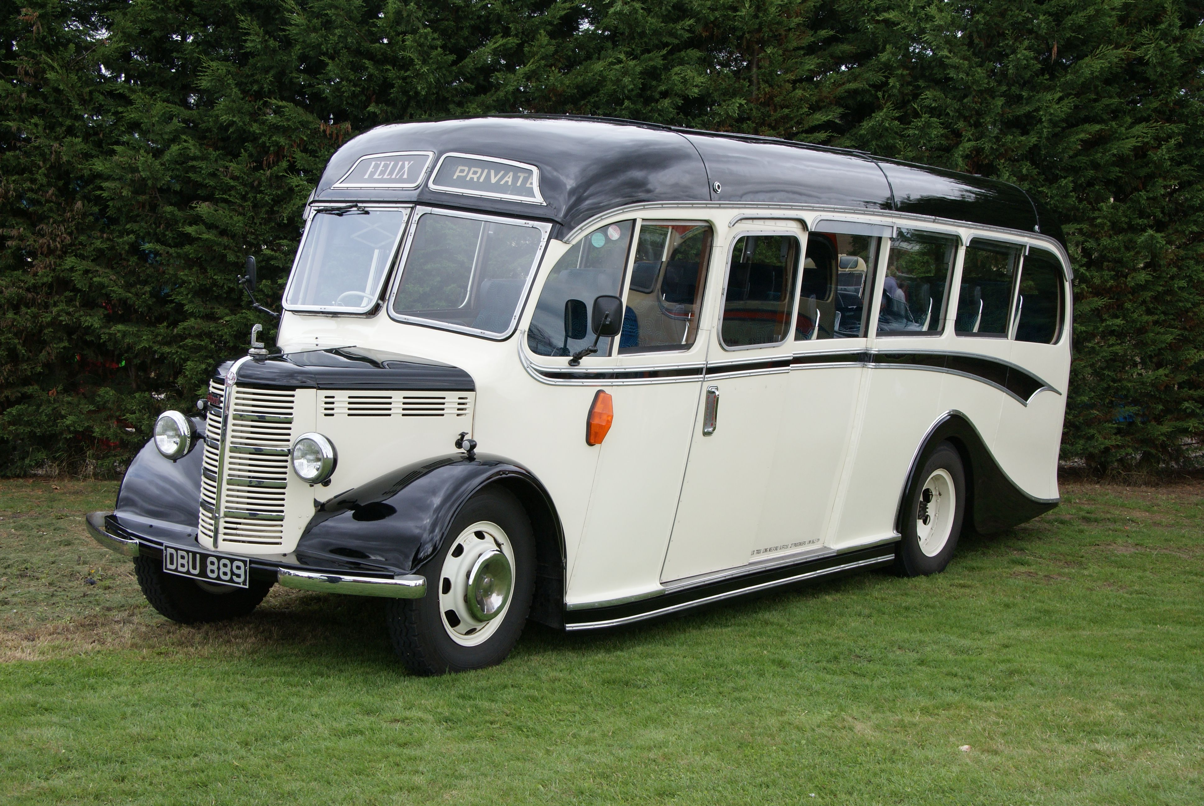 DBU889-2 290810 CPS